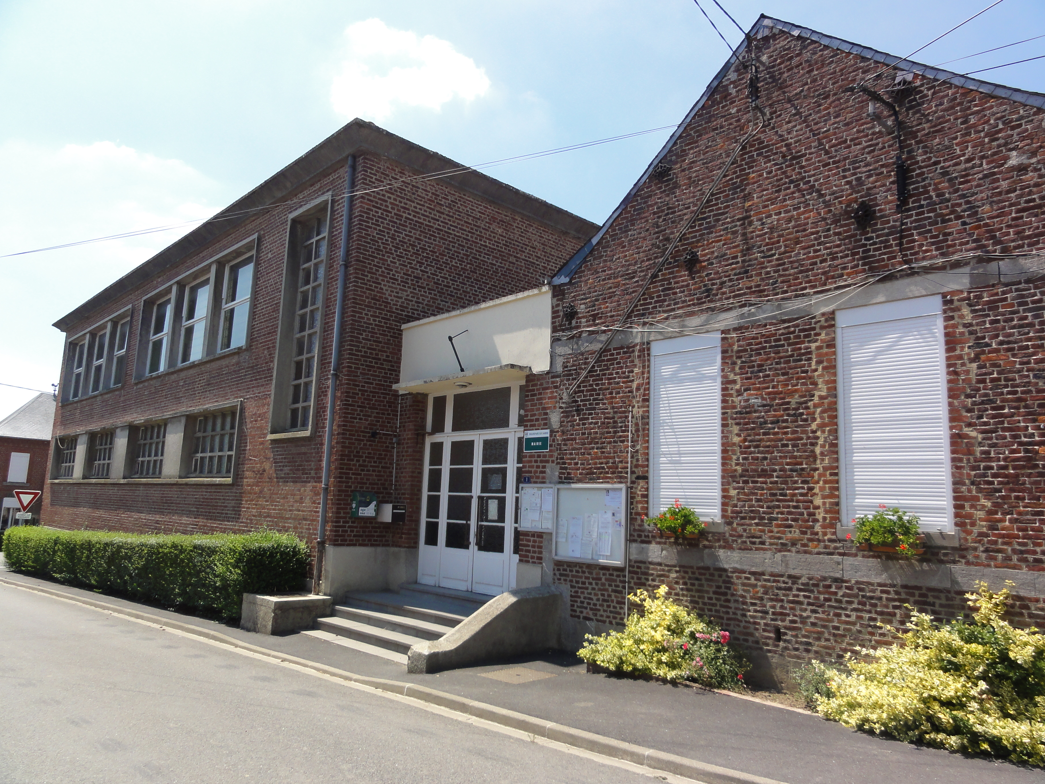 Beaurepaire-sur-Sambre (Nord, Fr) mairie